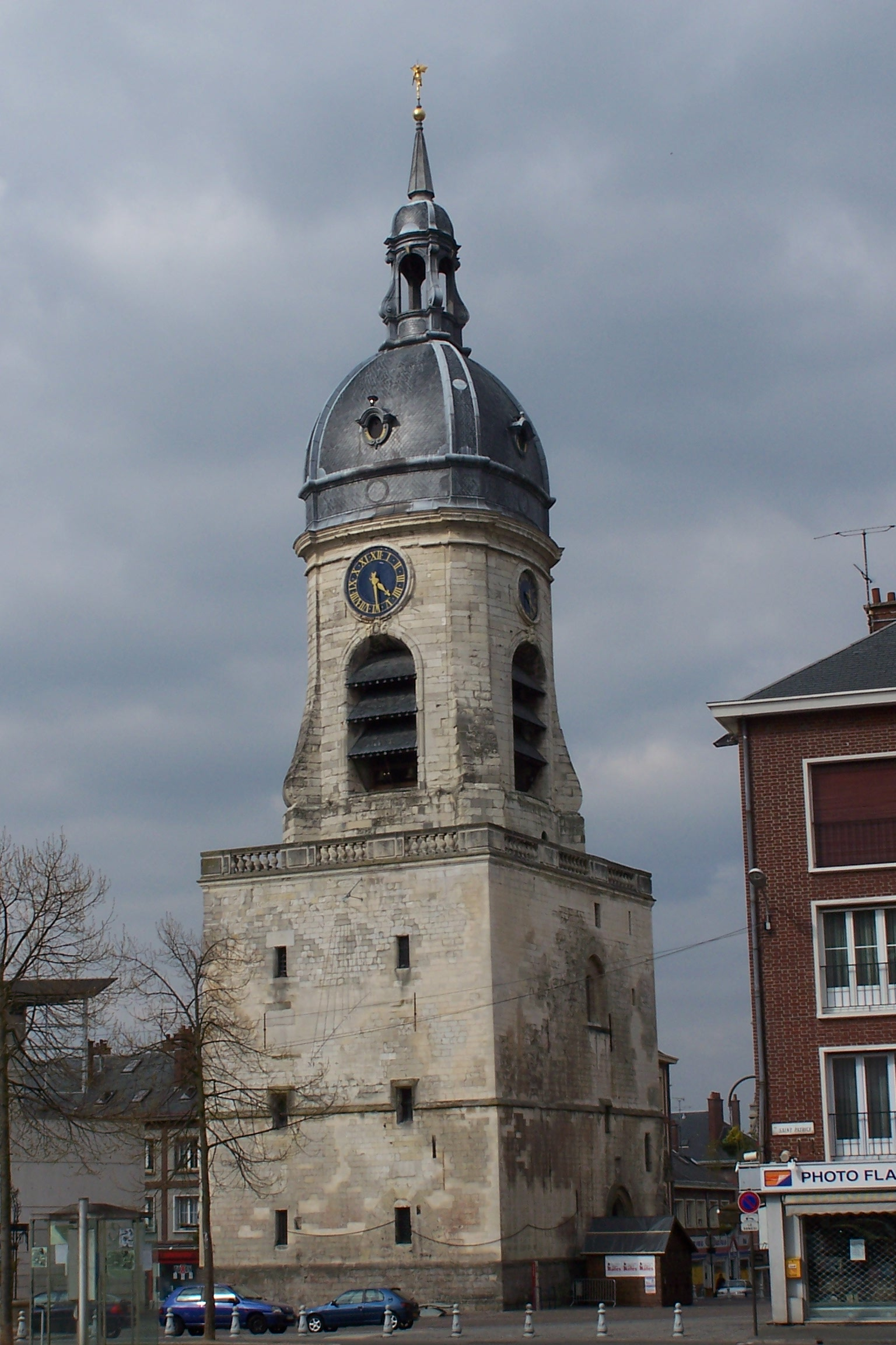 Le beffroi d'Amiens